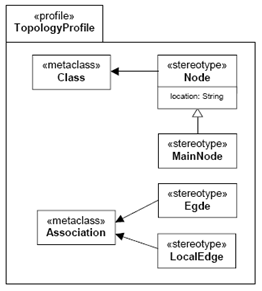 2. irudiko metamodeloaren perfila